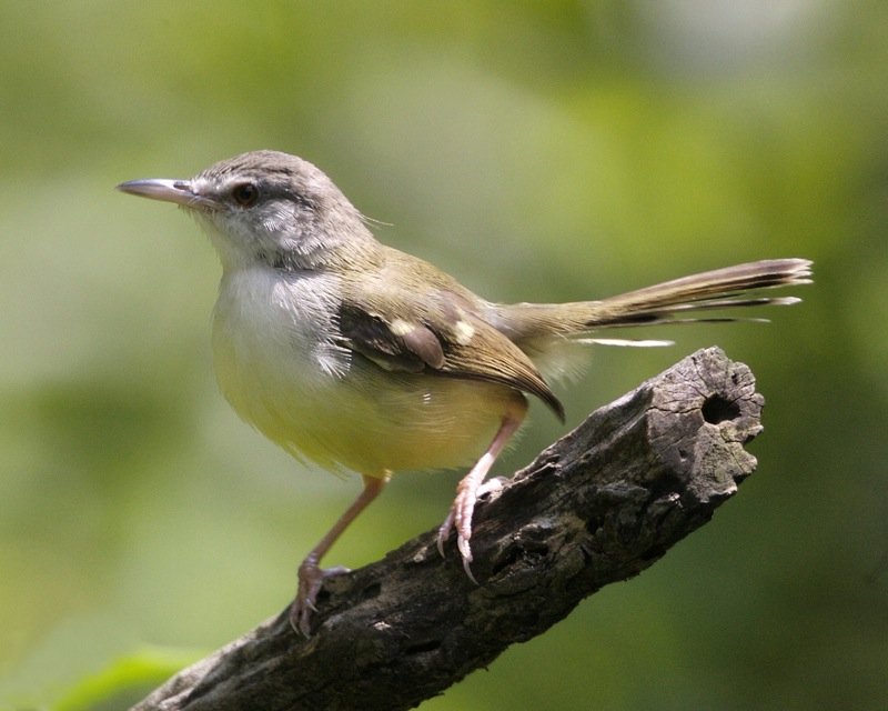 Bar-winged Prinia Prinia familiaris Indonesian: Perenjak sayap garis Bogor Botanic Garden, Bogor, Java, Indonesia 19th. October 2008 690V4257